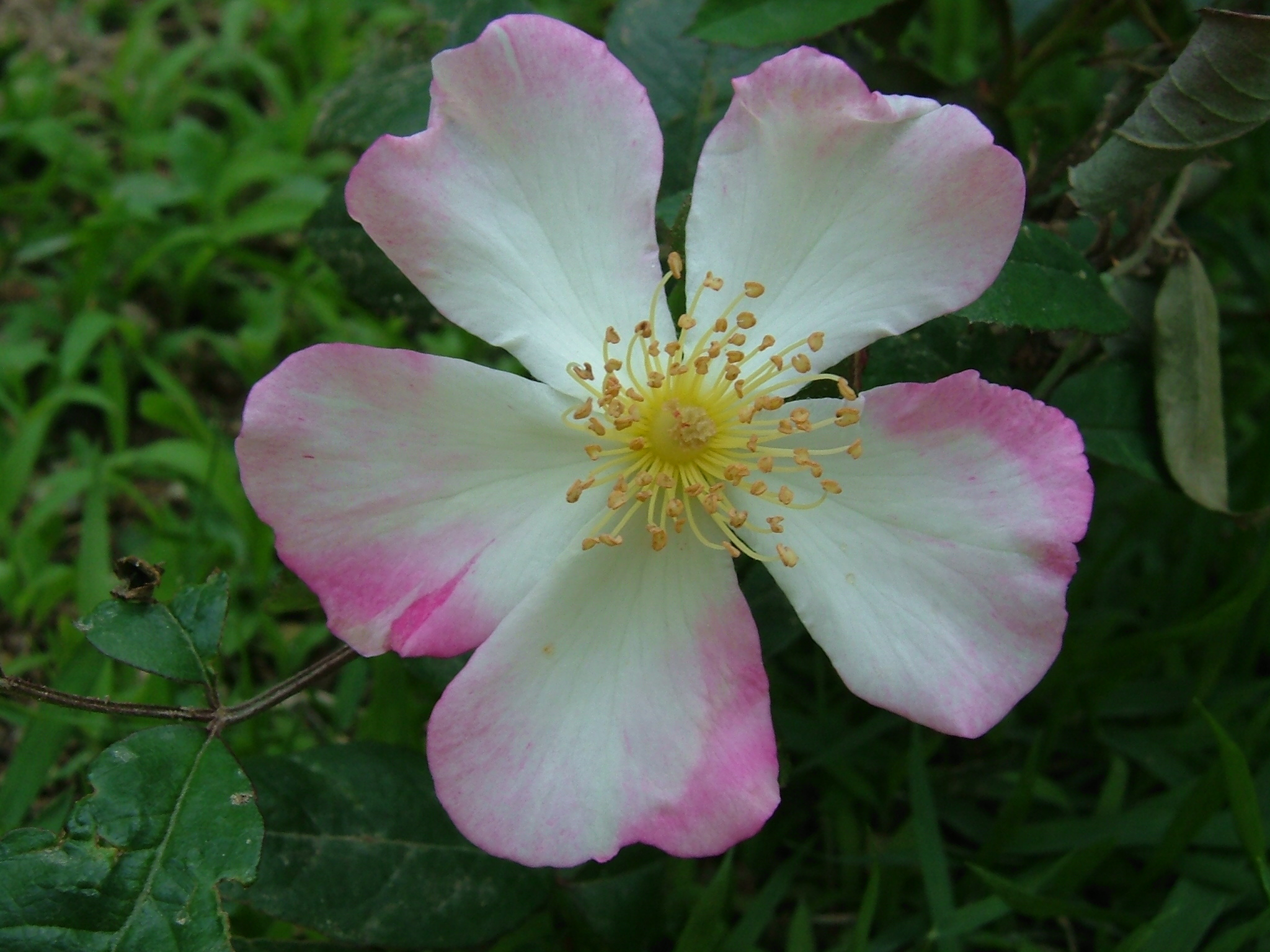 ロサ ウチヤマネ（サクライバラ）Rosa multiflora var. cathayensis (Rosa uchiyamane)